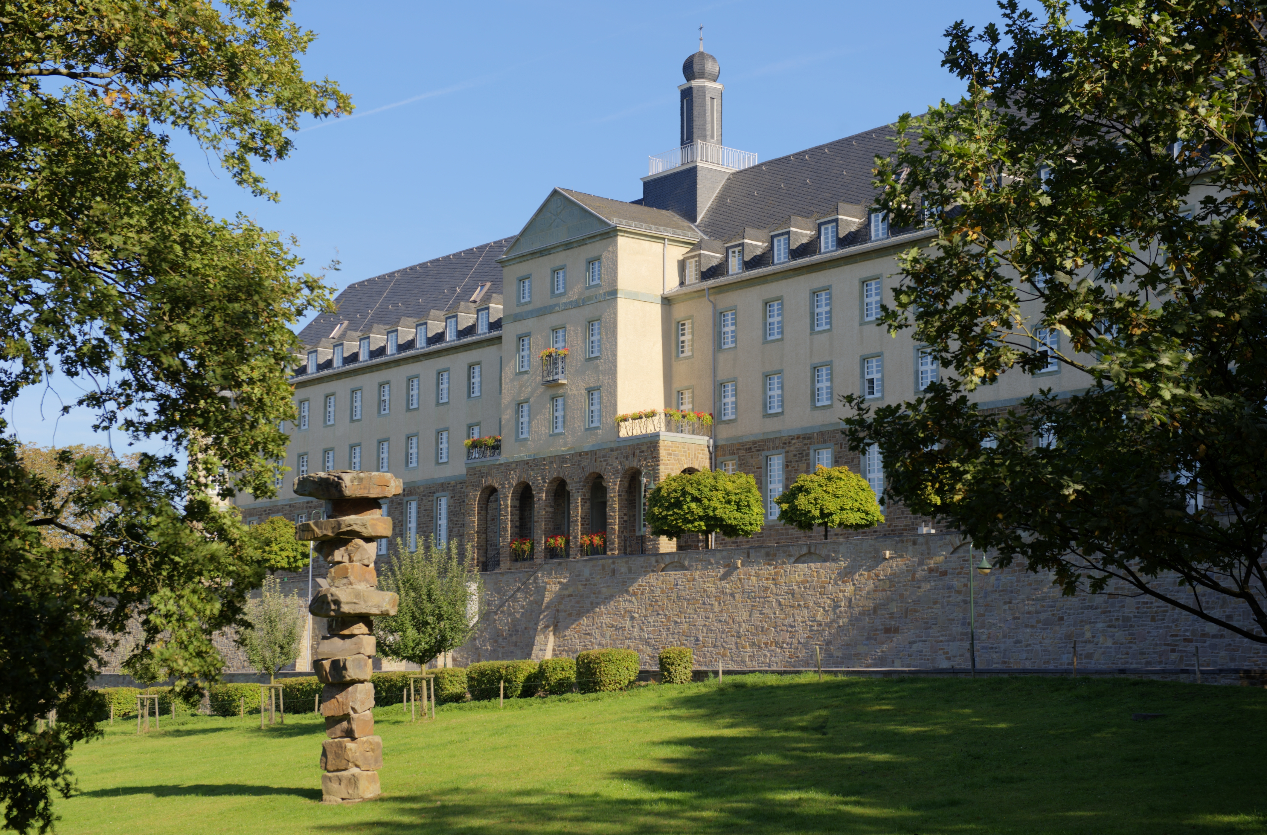 Kardinal-Schulte-HausThis is a photograph of an architectural monument., no. 71